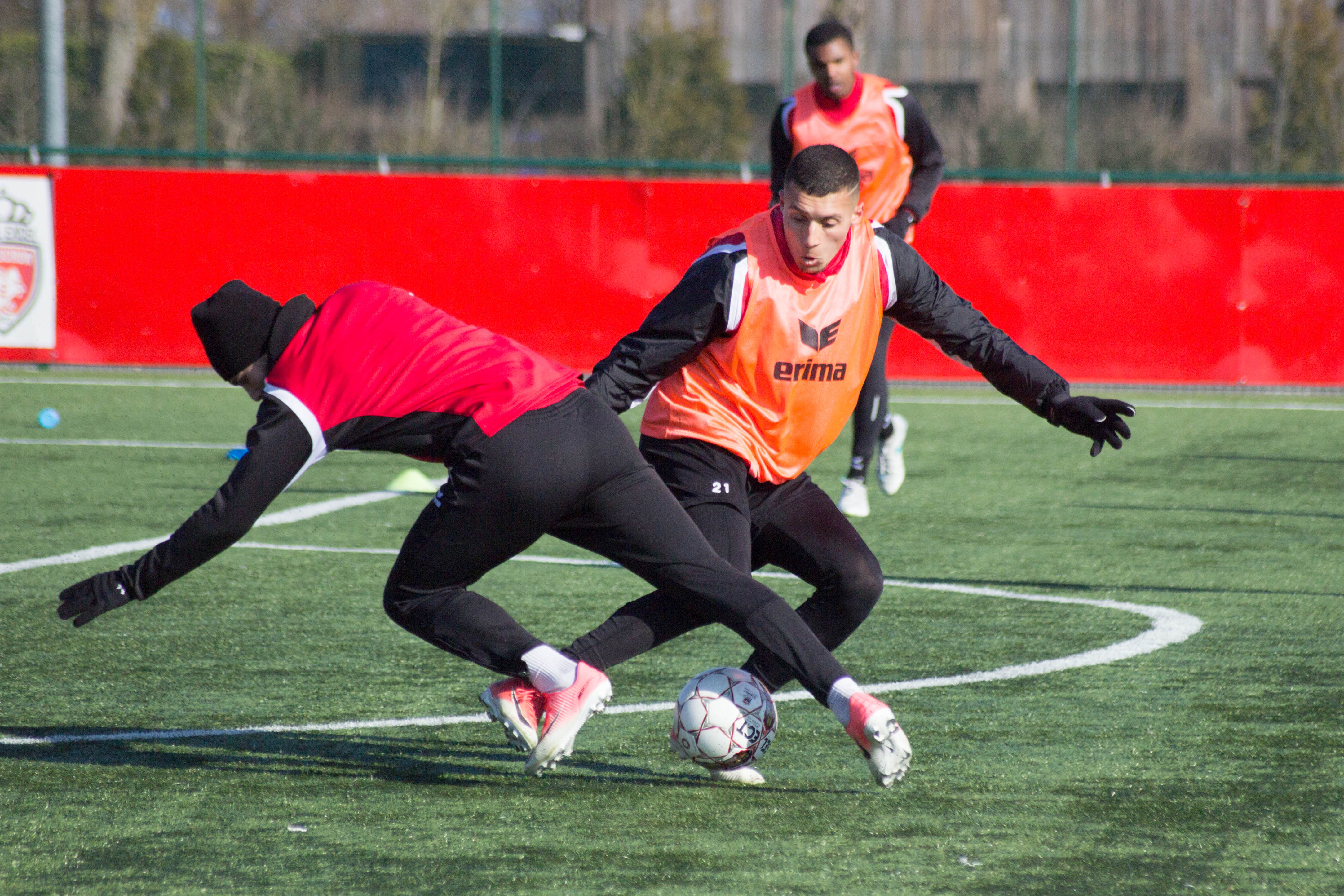 Entraînement du Royal Excel Mouscron, au Futurosport( Mouscron). Le 22 février 2018.